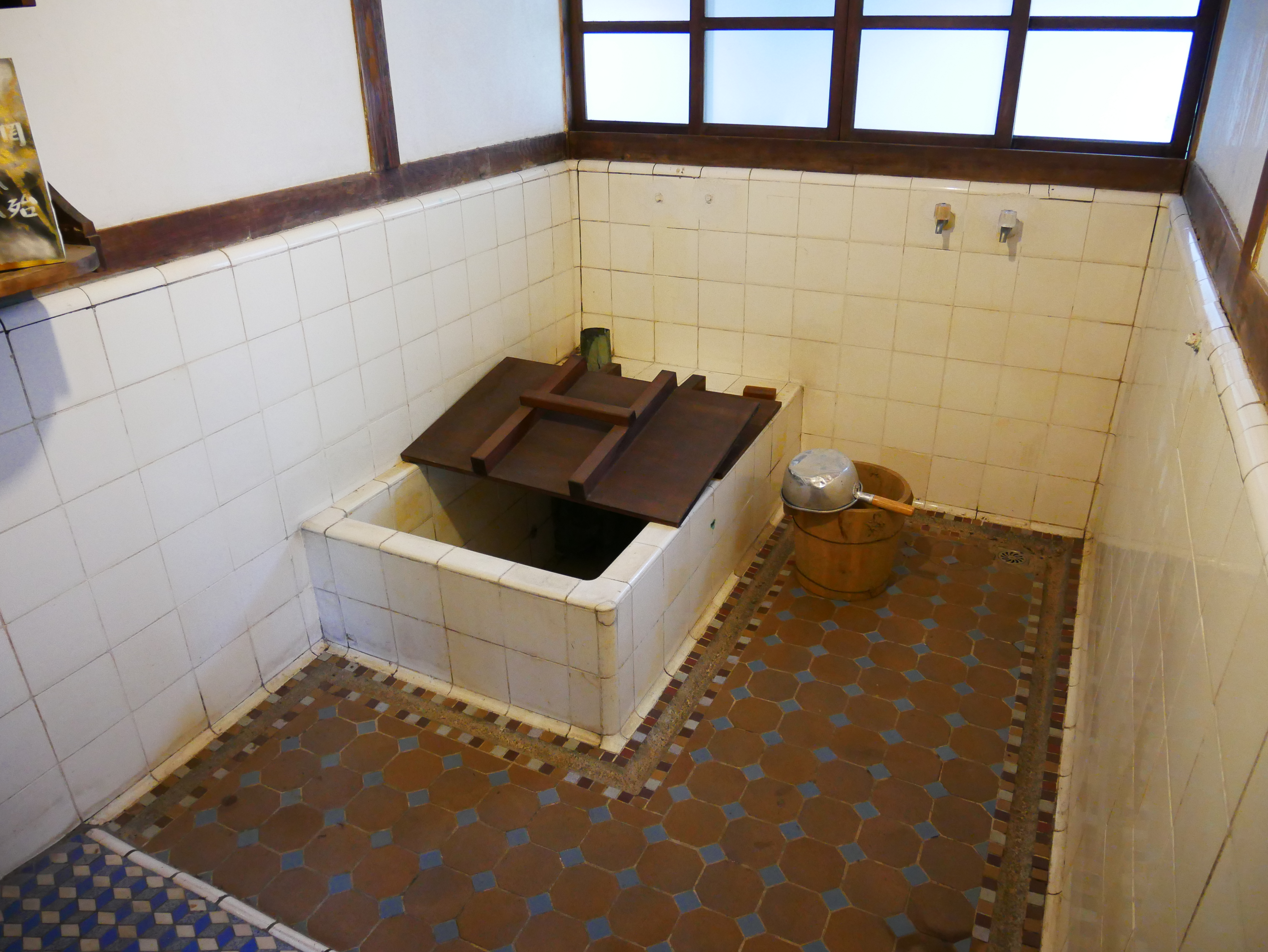 辛志平校長故居風呂，新竹市東區東門聯里育賢里